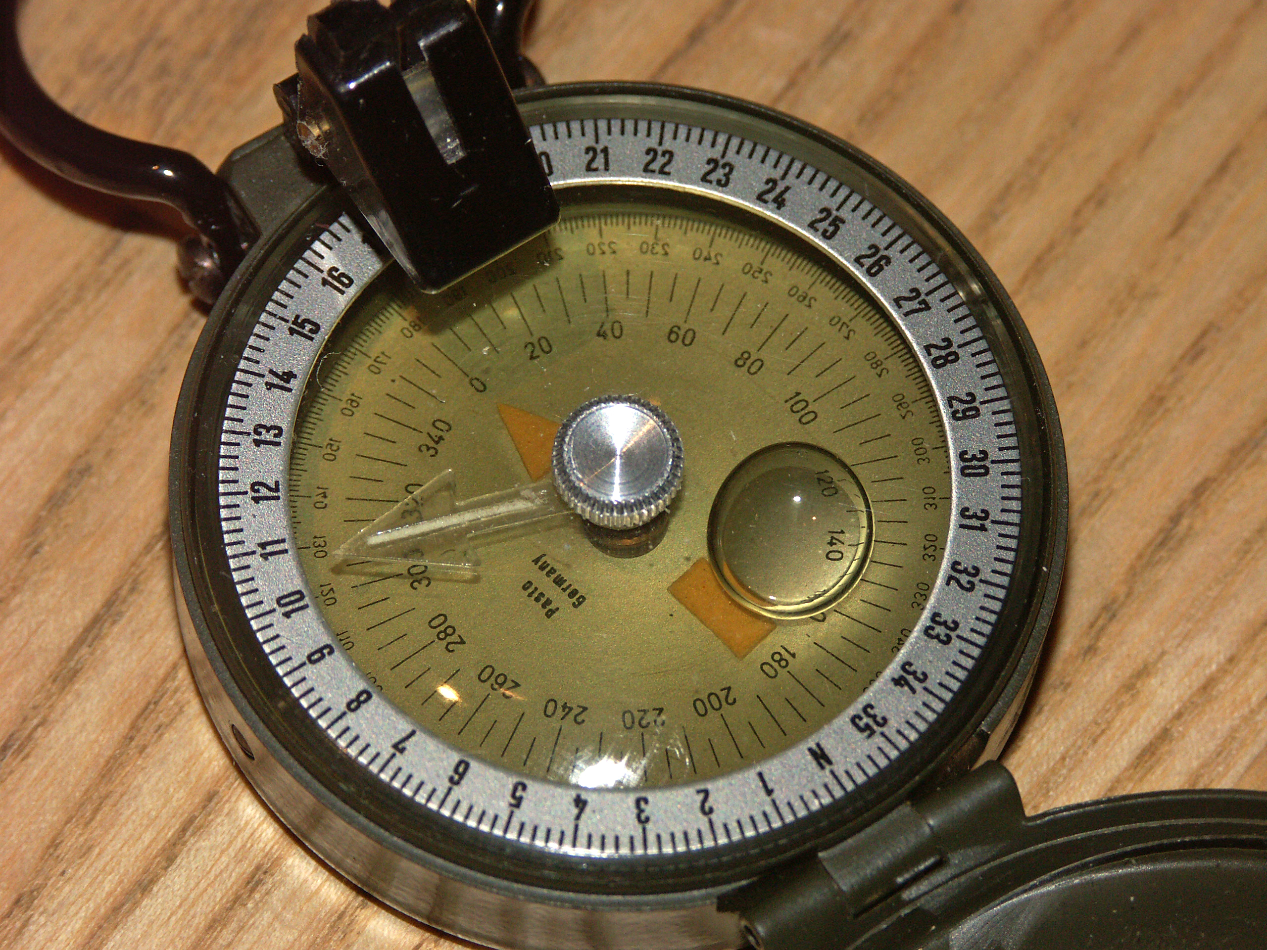 Compass_boussole à prisme